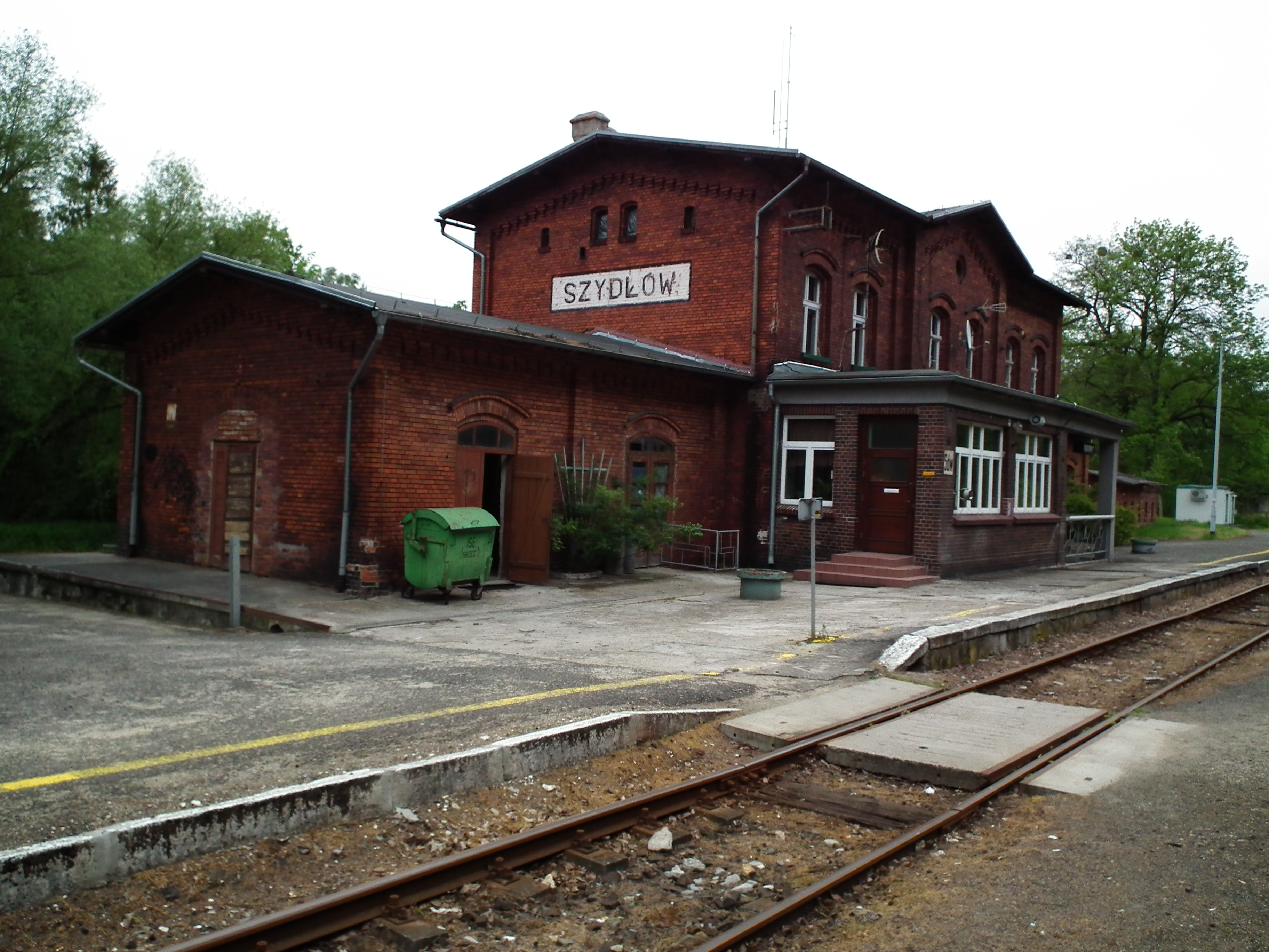 Stacja kolejowa w Szydłowie.